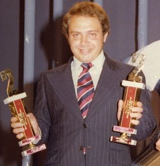 Gilberto Varela recibiendo el Dos de Oro